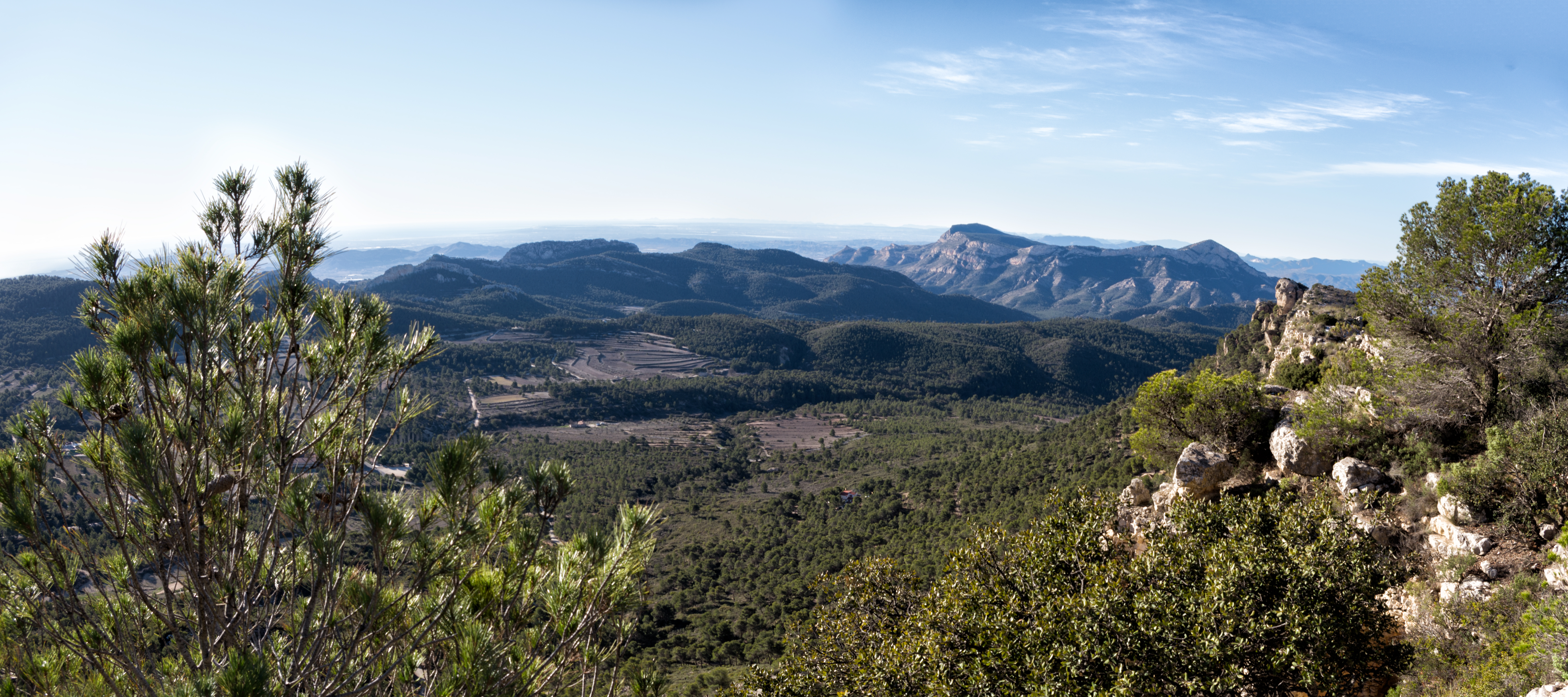 Panorámica del valle de Xorret de Catí (Castalla, Alicante - España)